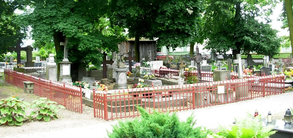 Cmentarz św. Jana Bydgoszcz - lapidarium